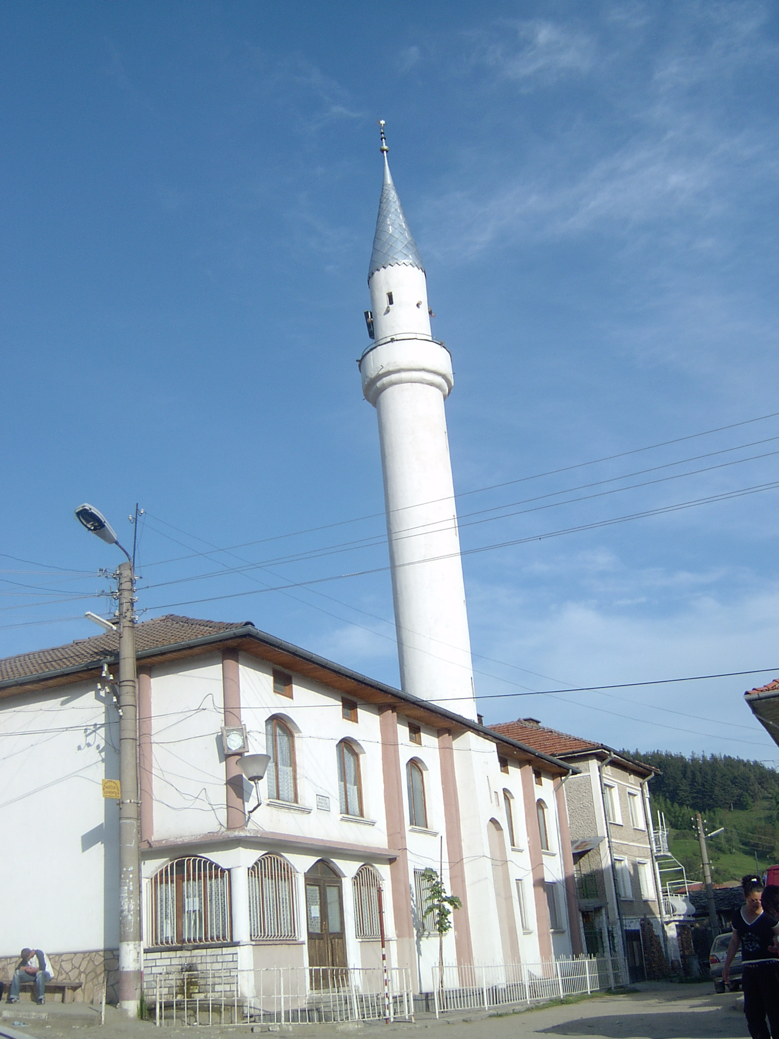 Джамията в с. Кочан, построена 1990 г. на мястото на старата джамия, която е била съборена от тоталитарния режим. Джимо, 2006 г.